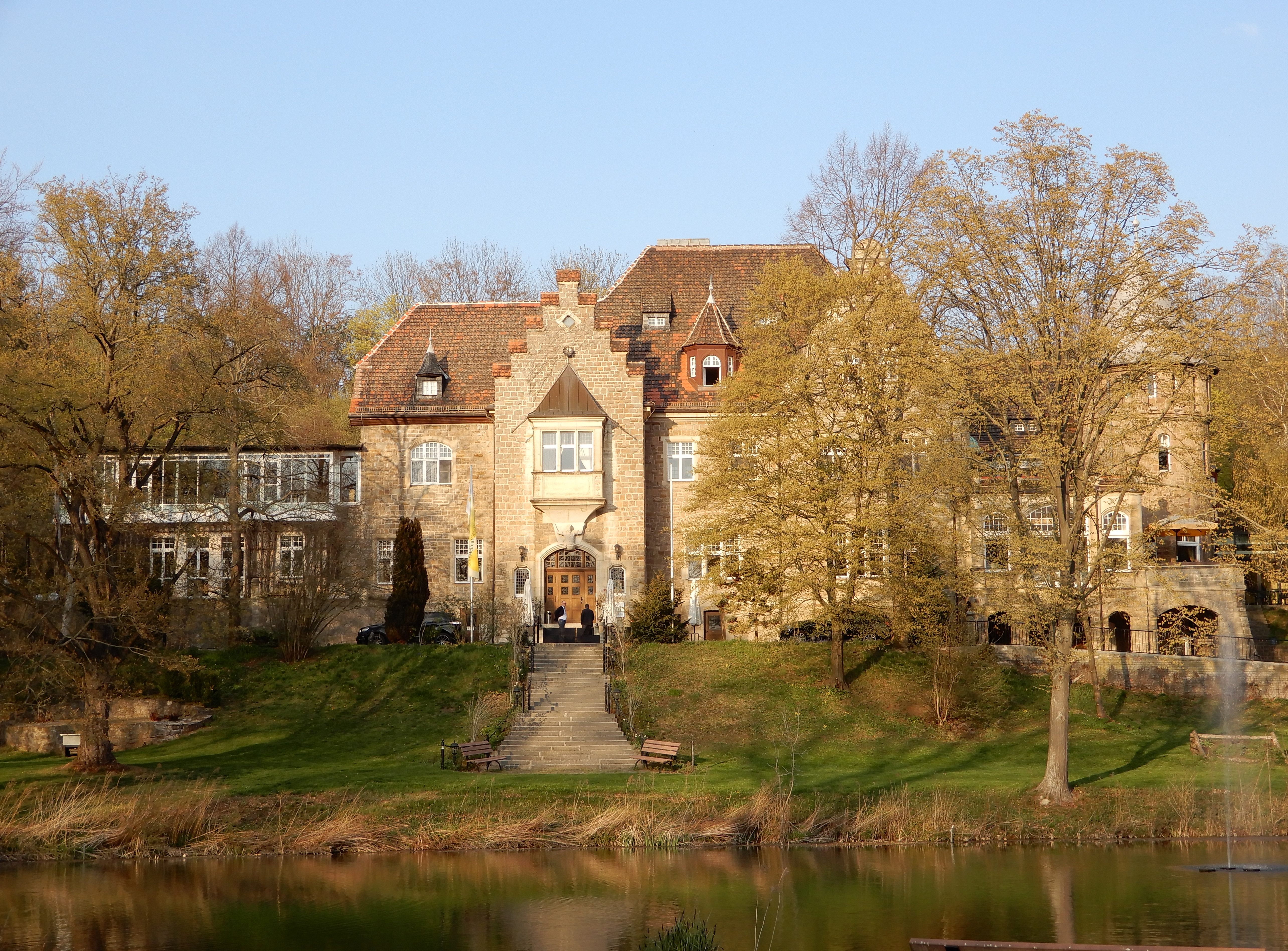 Villa Lapp an den Westerbergen in Aschersleben